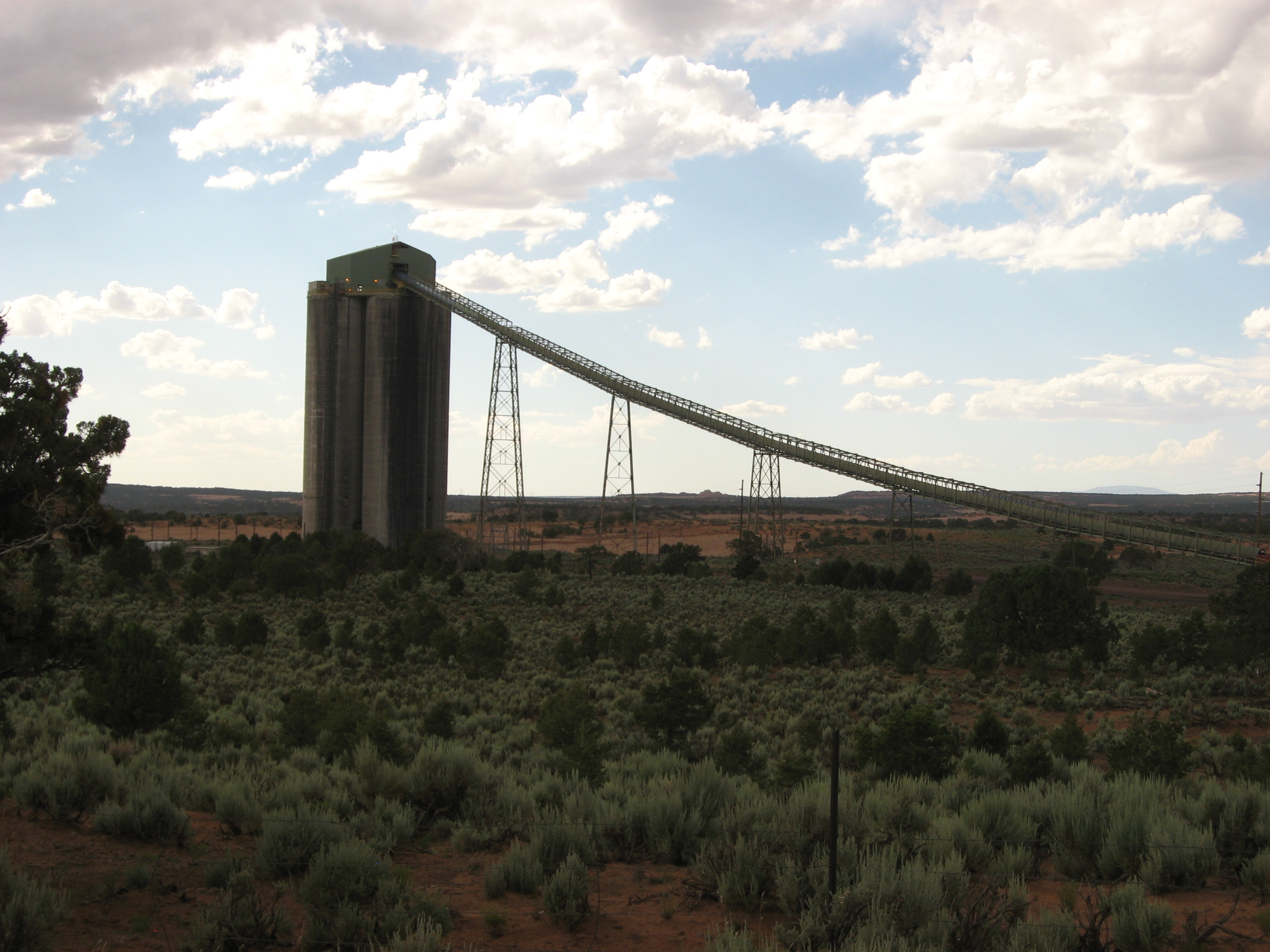 Black Mesa Coal Conveyor Belt, Black Mesa, Arizona